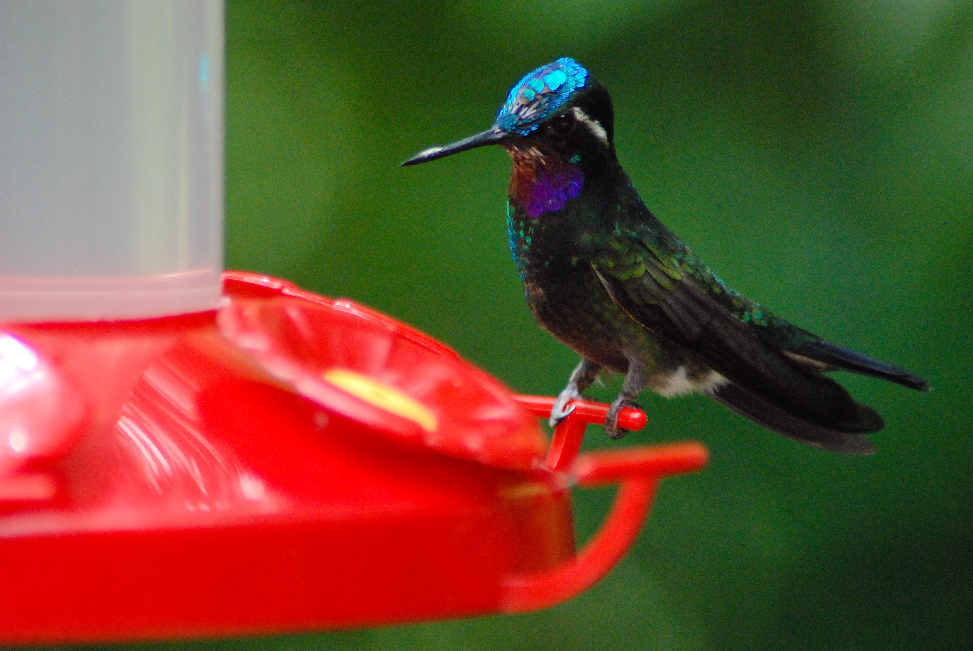 Male Lampornis calolaemus from Monteverde (Costa Rica)